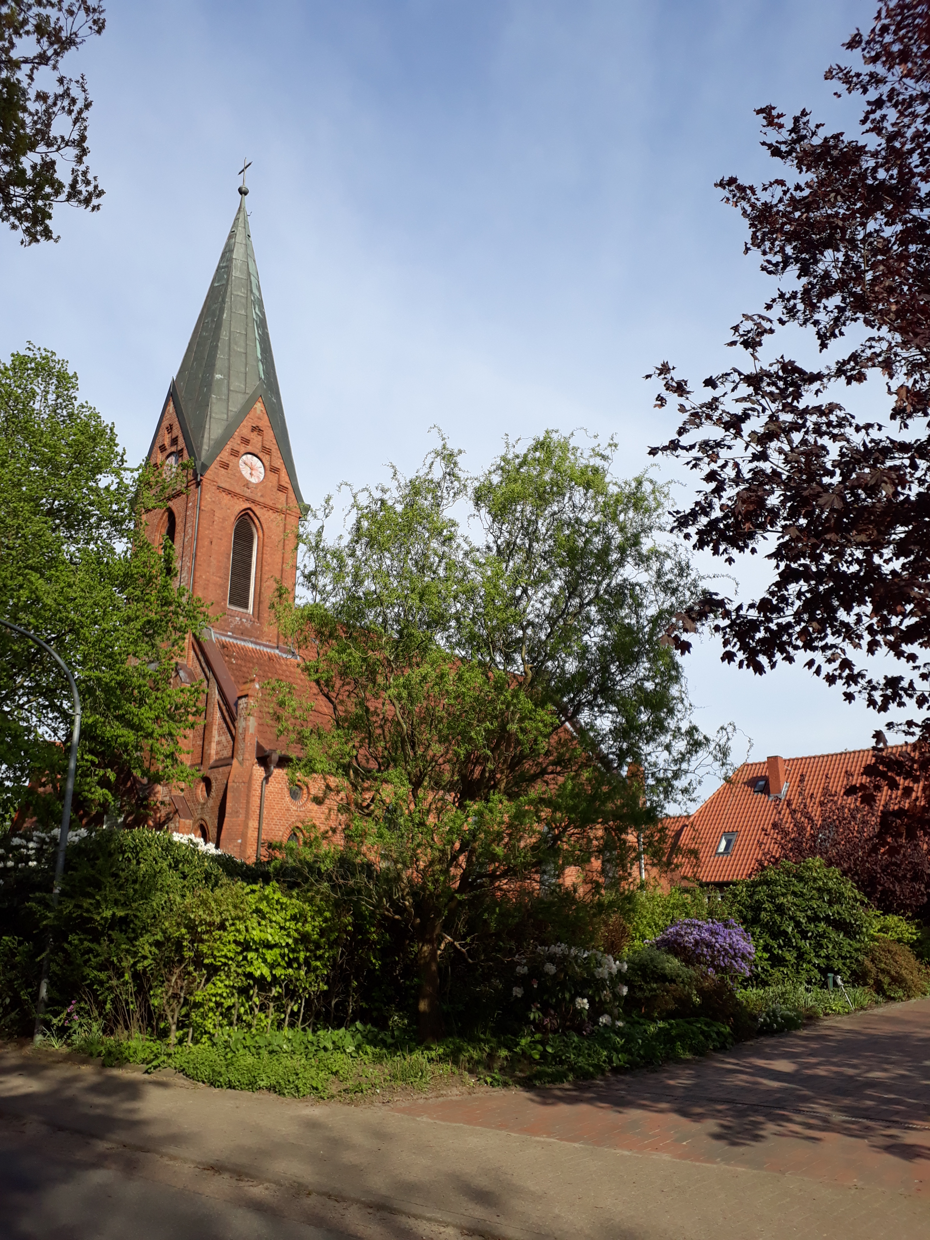 Kirche Farven, Kreis Rotenburg (Wümme), Niedersachsen.